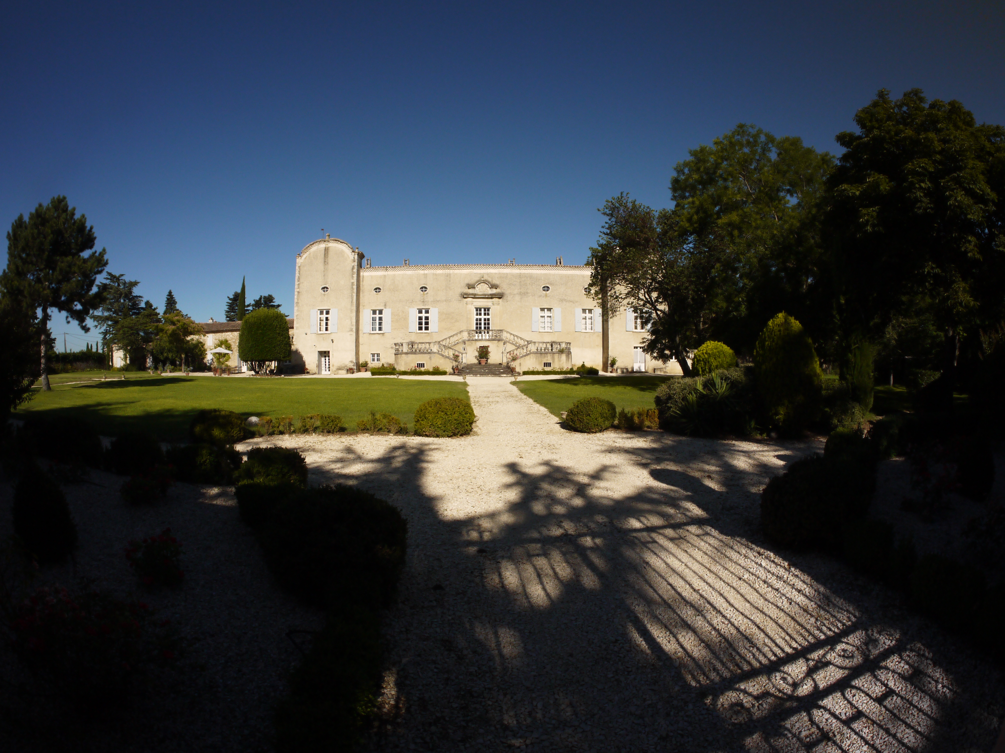 Château de Genas (Inscription) .